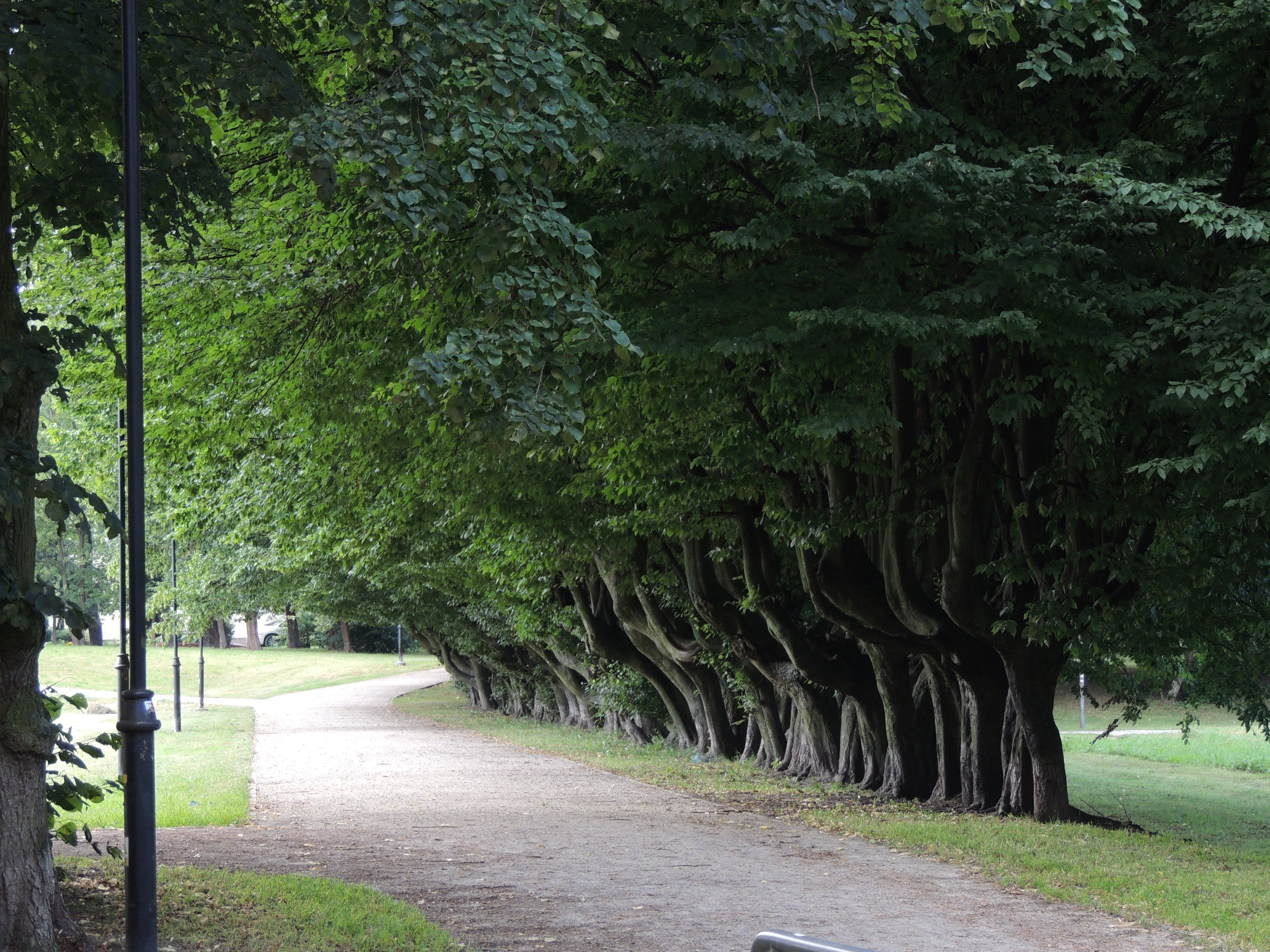 Elbląg, park im. Kajki